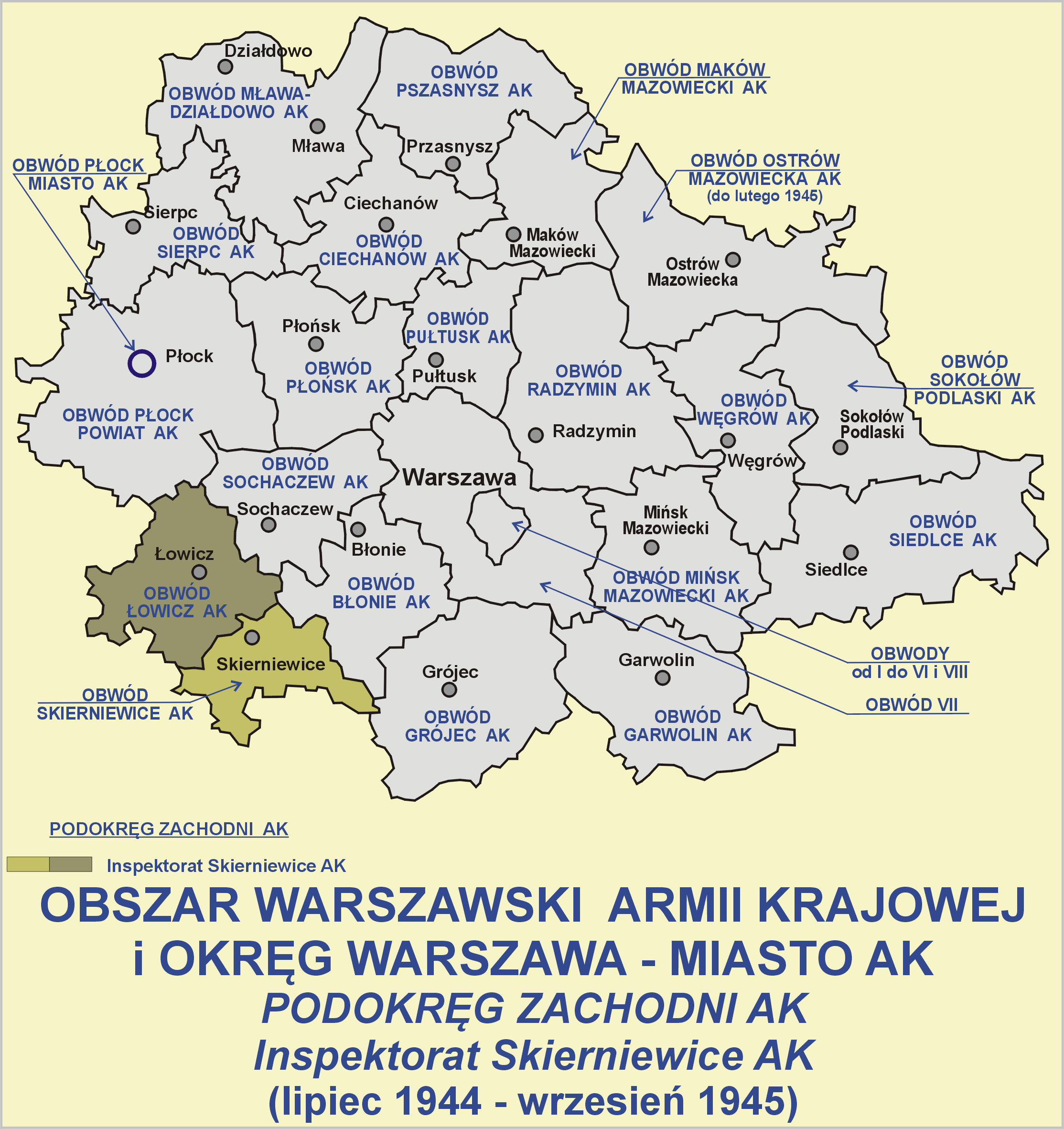 Obszar Warszawa AK i Okręg Warszawa - Miasto AK, Podokręg Zachodni AK - Inspektorat Skierniewice (lipiec 1944 - wrzesień 1945)